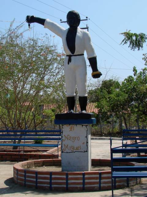 ElCuadrado-PlazaNegroMiguel